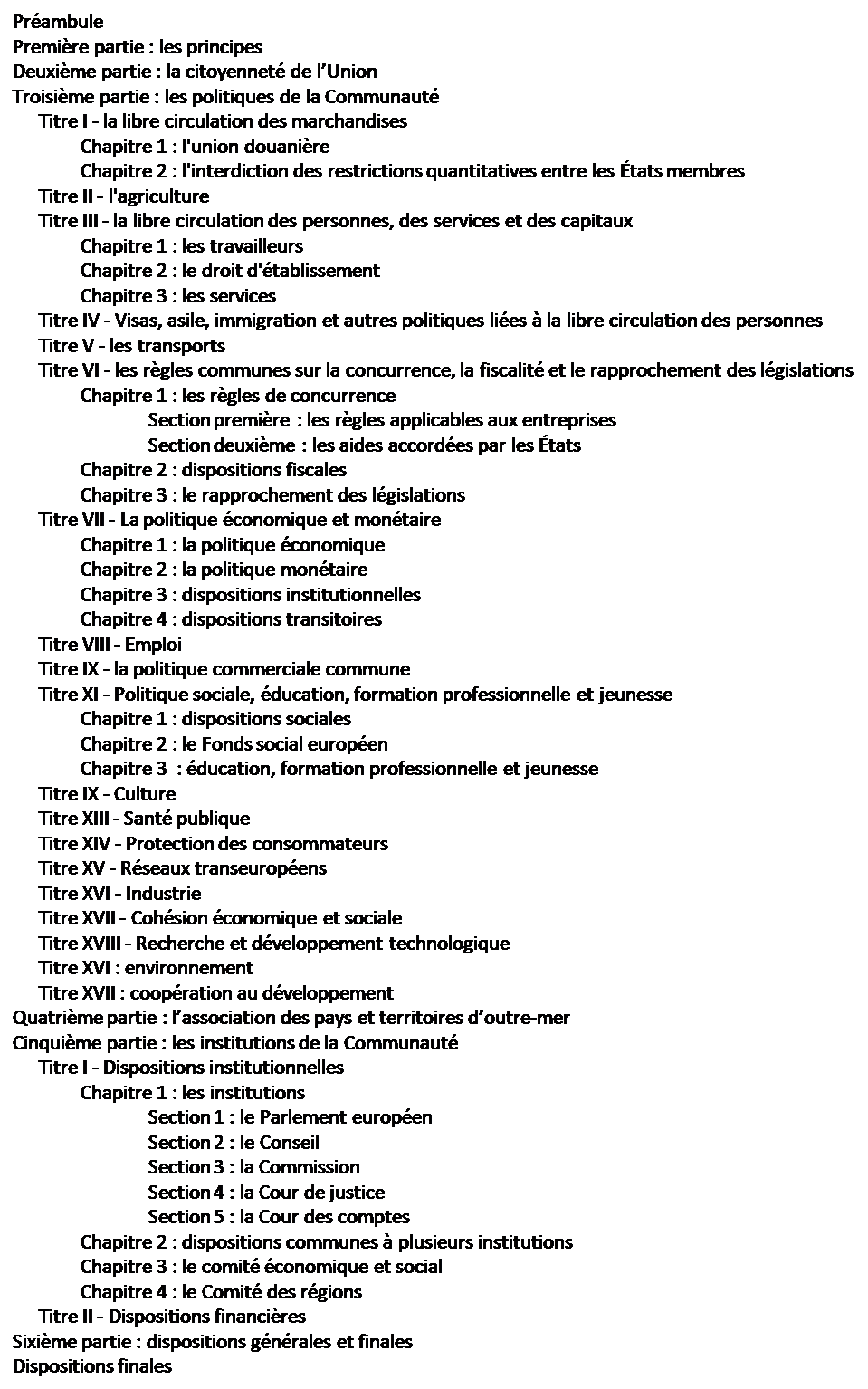 Plan du traité instituant la Communauté européenne en 1997.